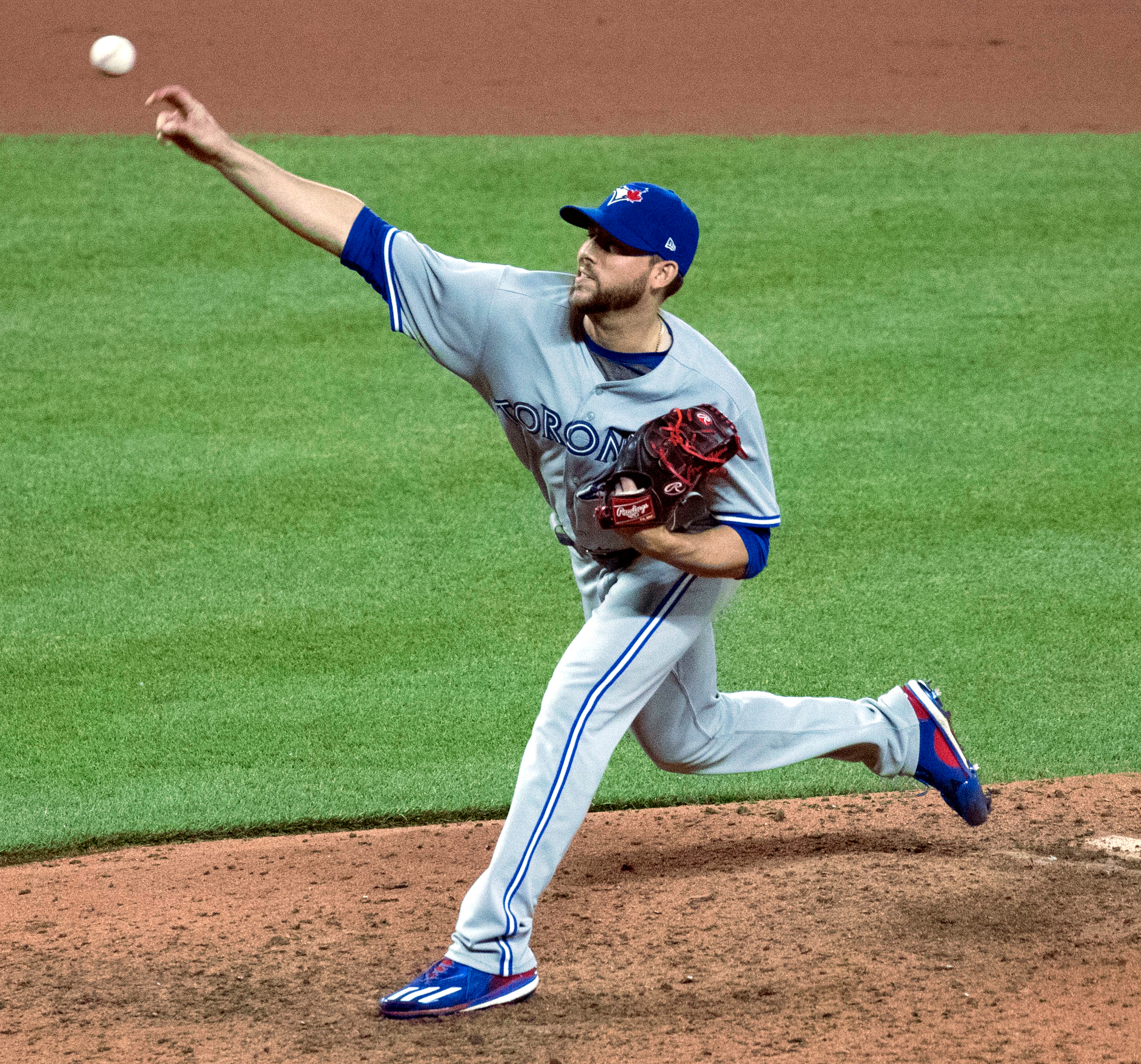 Blue Jays at Orioles 5/19/17